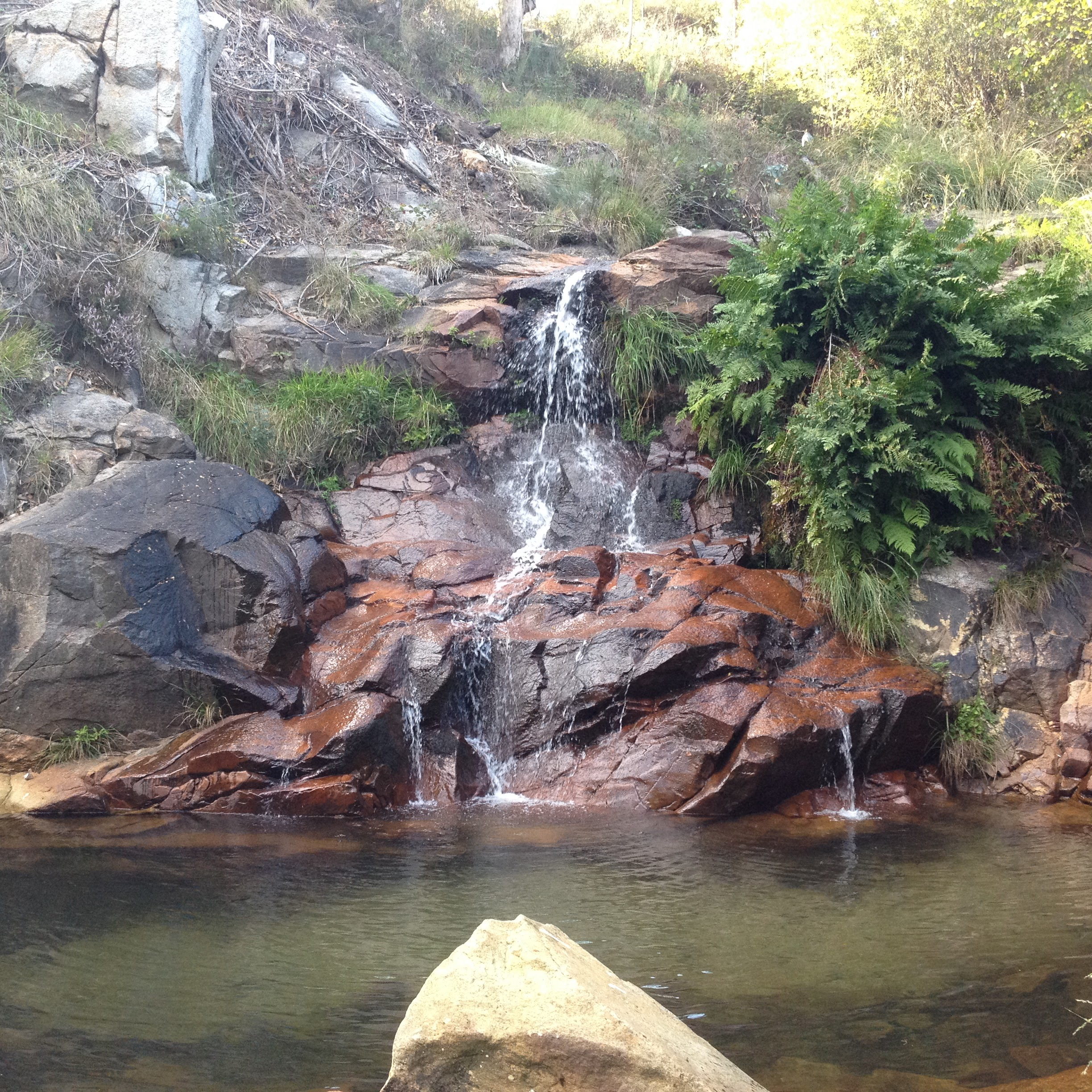 Fervenza da Poza da Moura